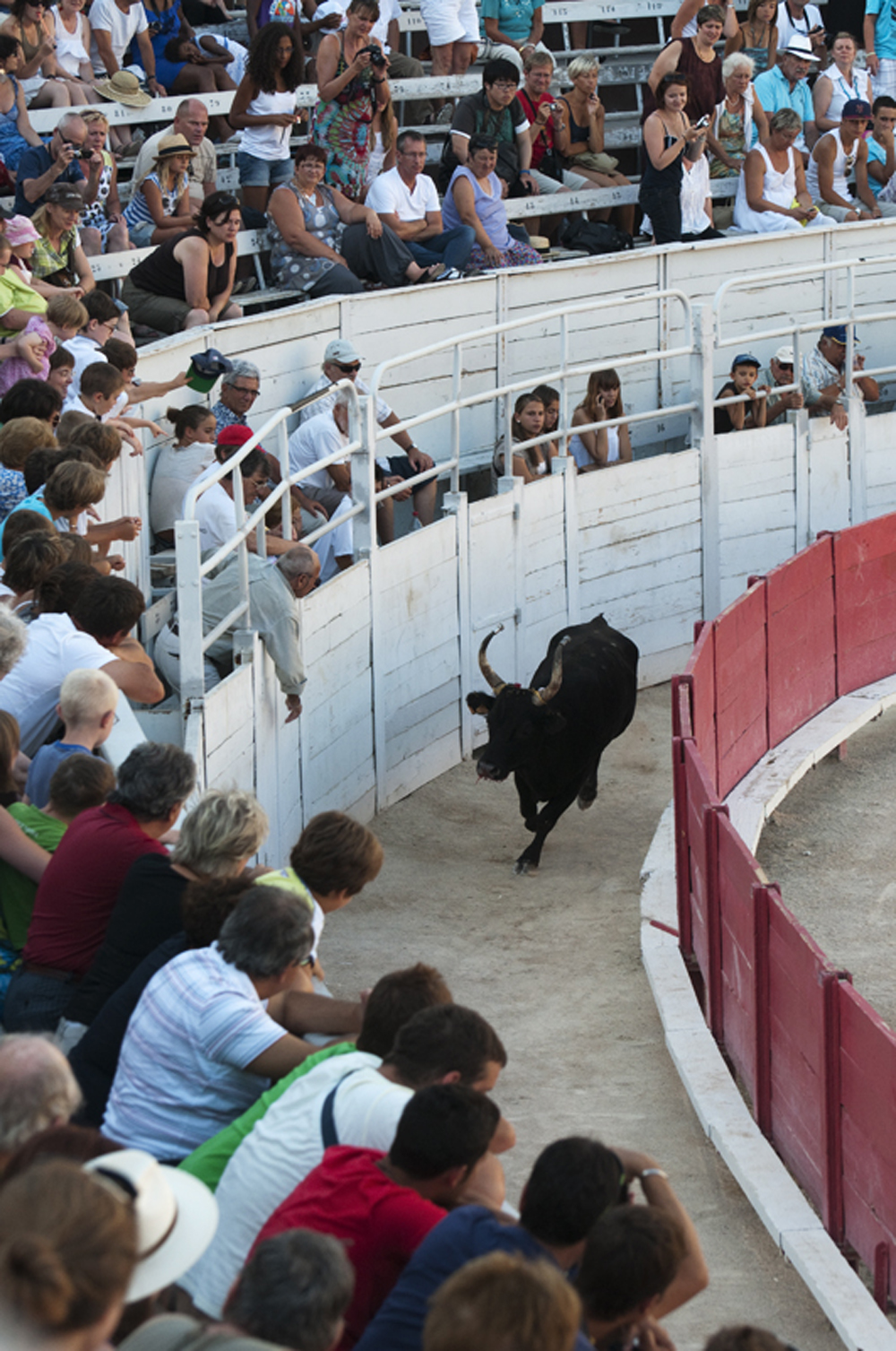 Taureau derrière les talanquères